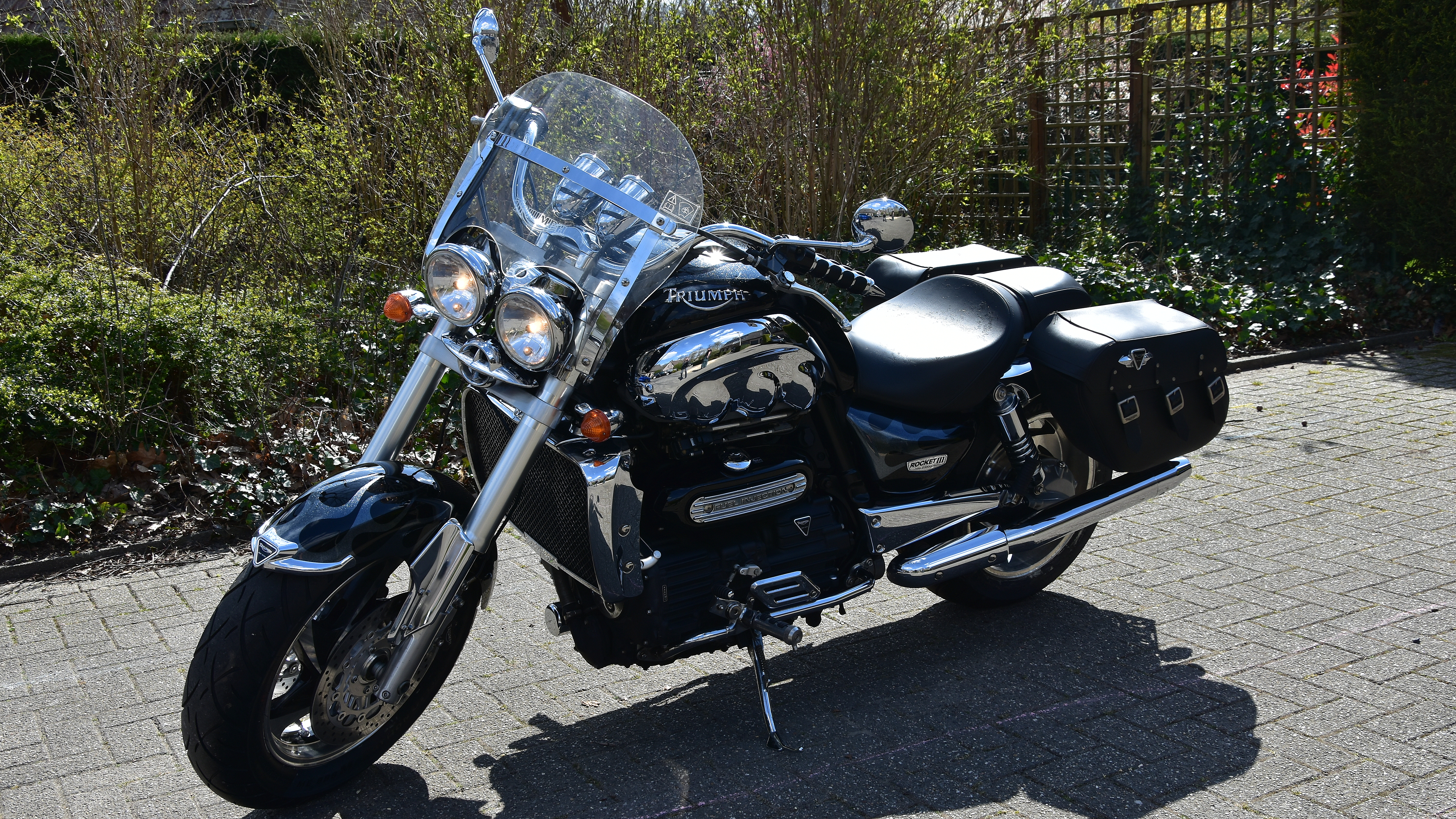 Triumph Rocket III 5-04-2020 13-47-05